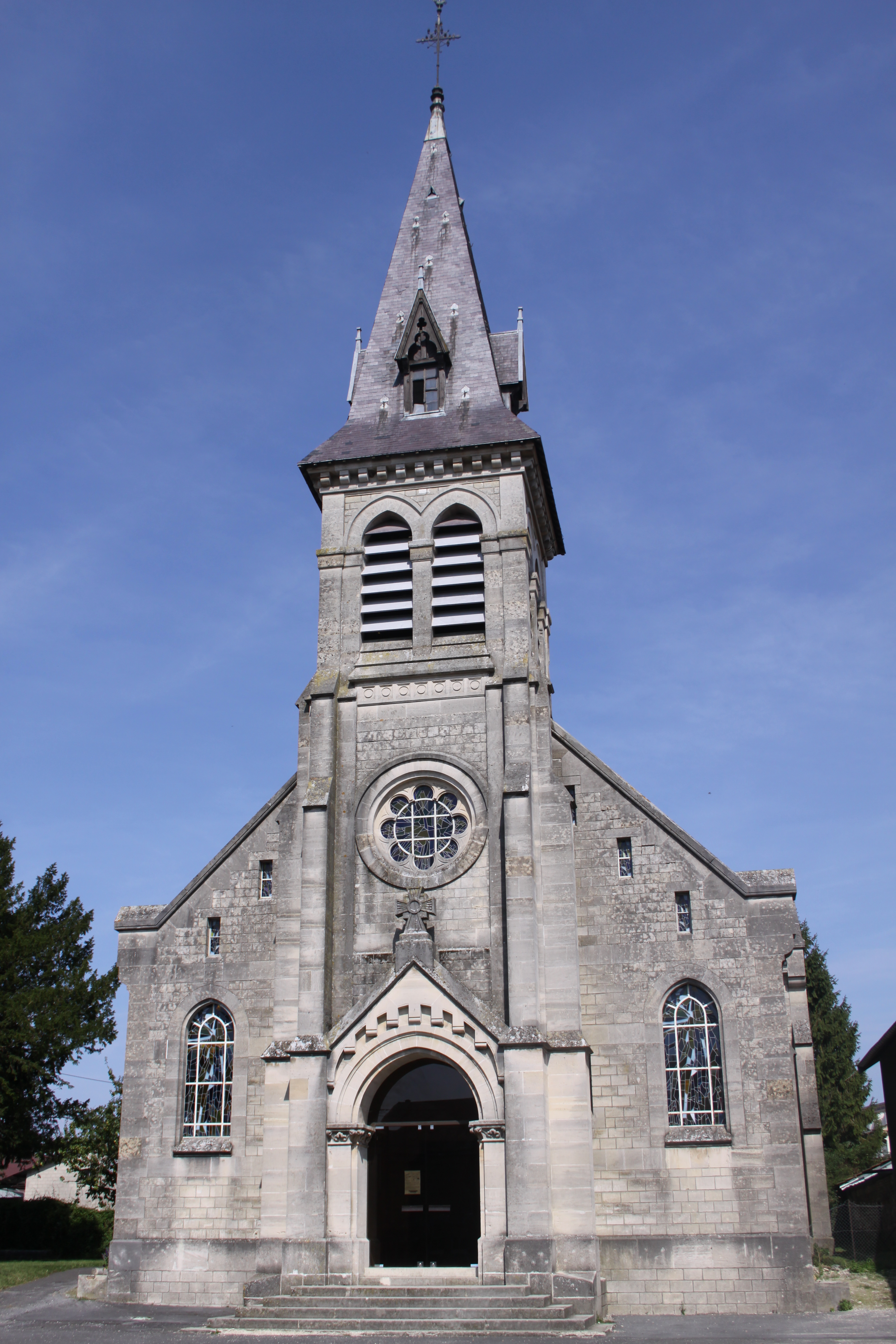 Village Ardennais